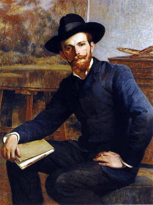 Pablo Burchard Eggeling (Santiago de Chile, 4 de noviembre de 1875 - íd., 13 de julio de 1964) fue un pintor chileno. Su padre fue el arquitecto alemán Teodoro Burchard, que llegó a Chile hacia 1855, e introdujo el estilo gótico.